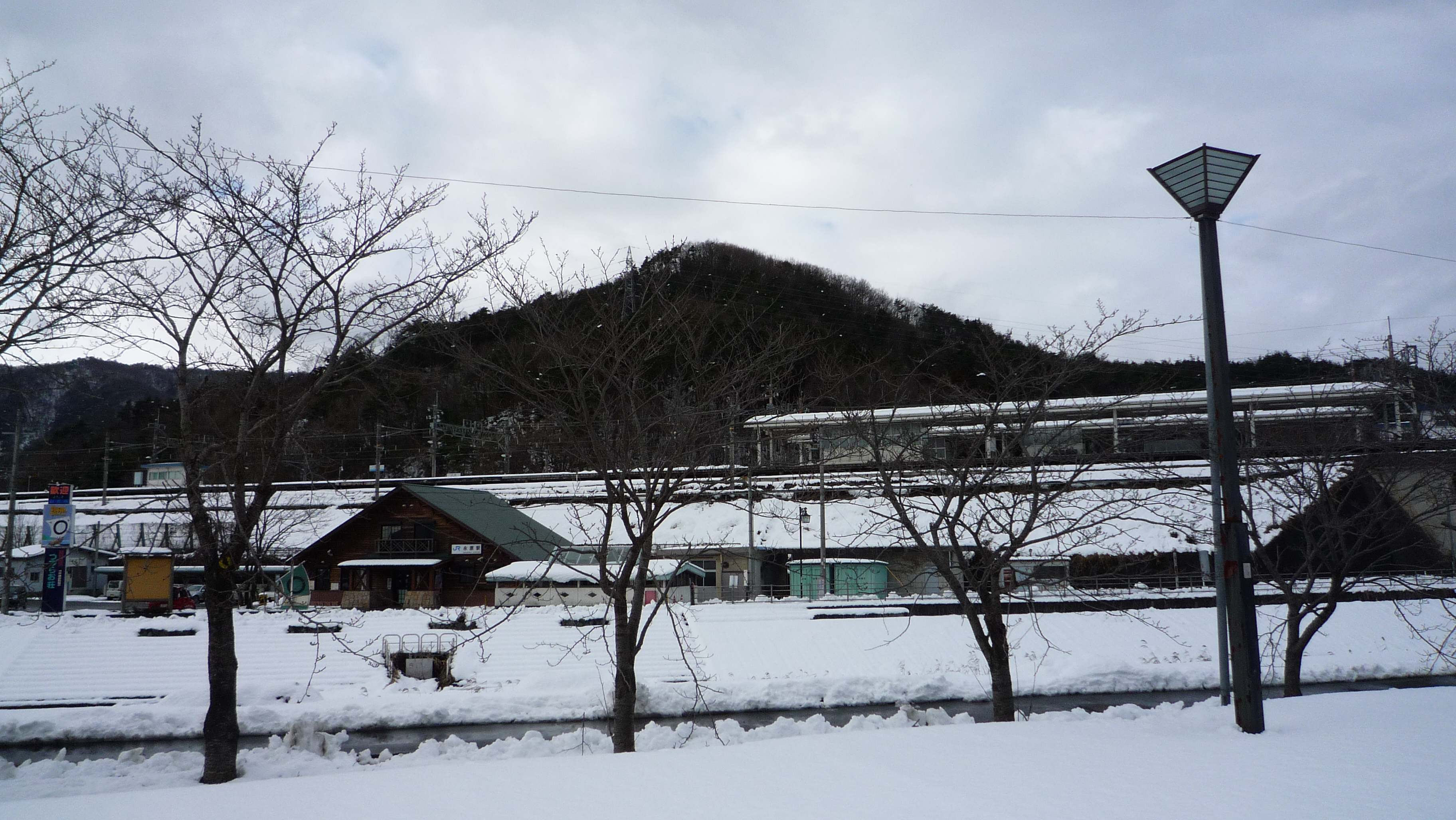 雪の永原駅